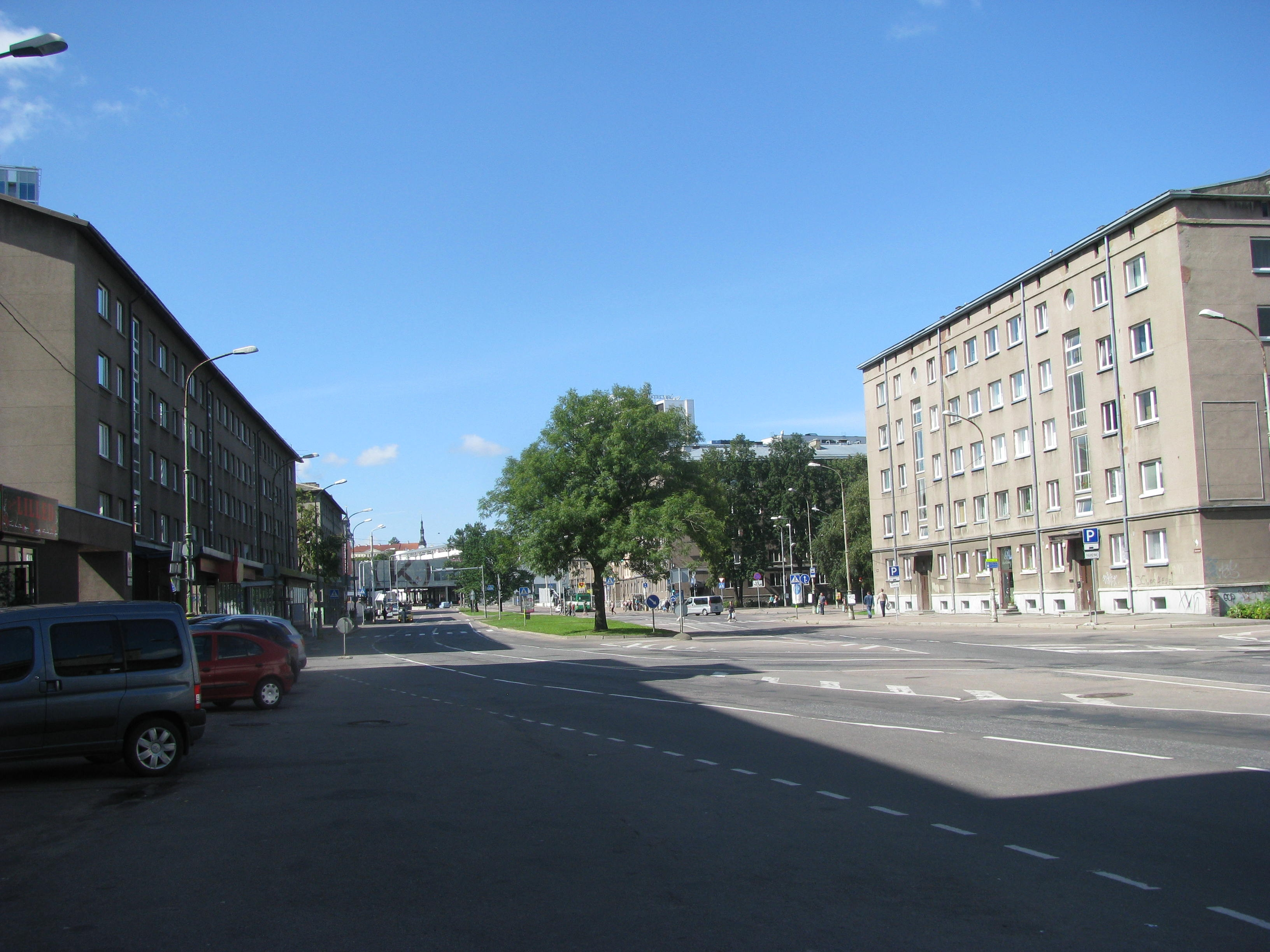 Gonsiori tänav Tallinnas, vaade Pronksi ristmiku juurest kaubamaja poole.